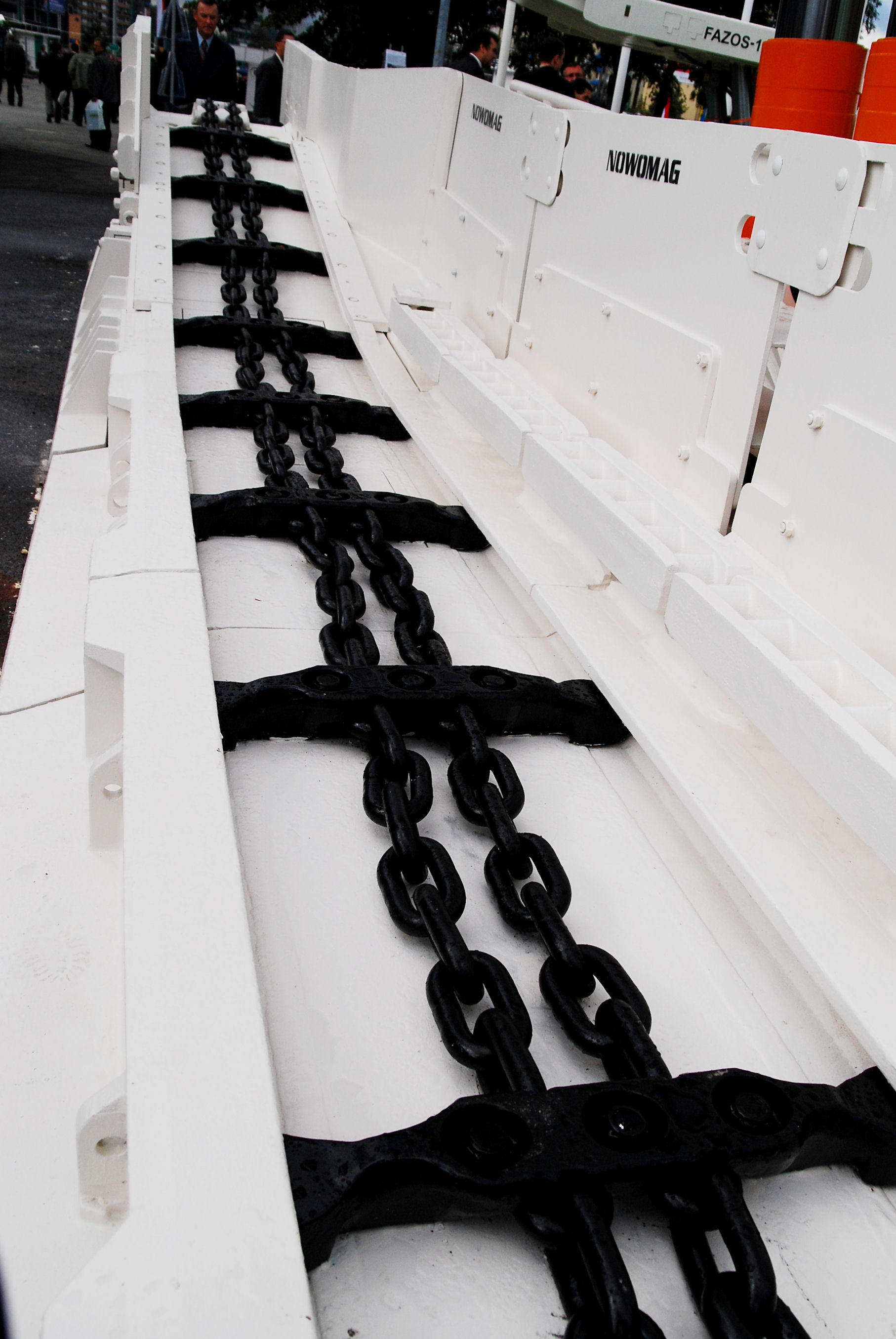 Urządzenie górnicze zdjęcie wykonane podczas Międzynarodowych Targów Górnictwa, Przemysłu Energetycznego i Hutniczego w Katowicach w Spodku